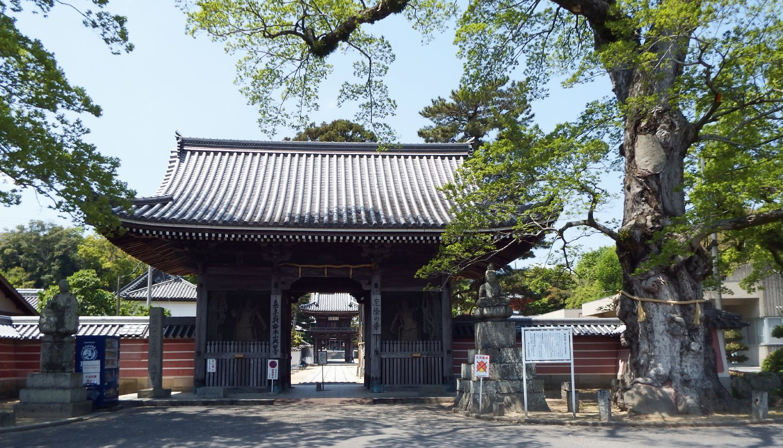 與田寺の仁王門